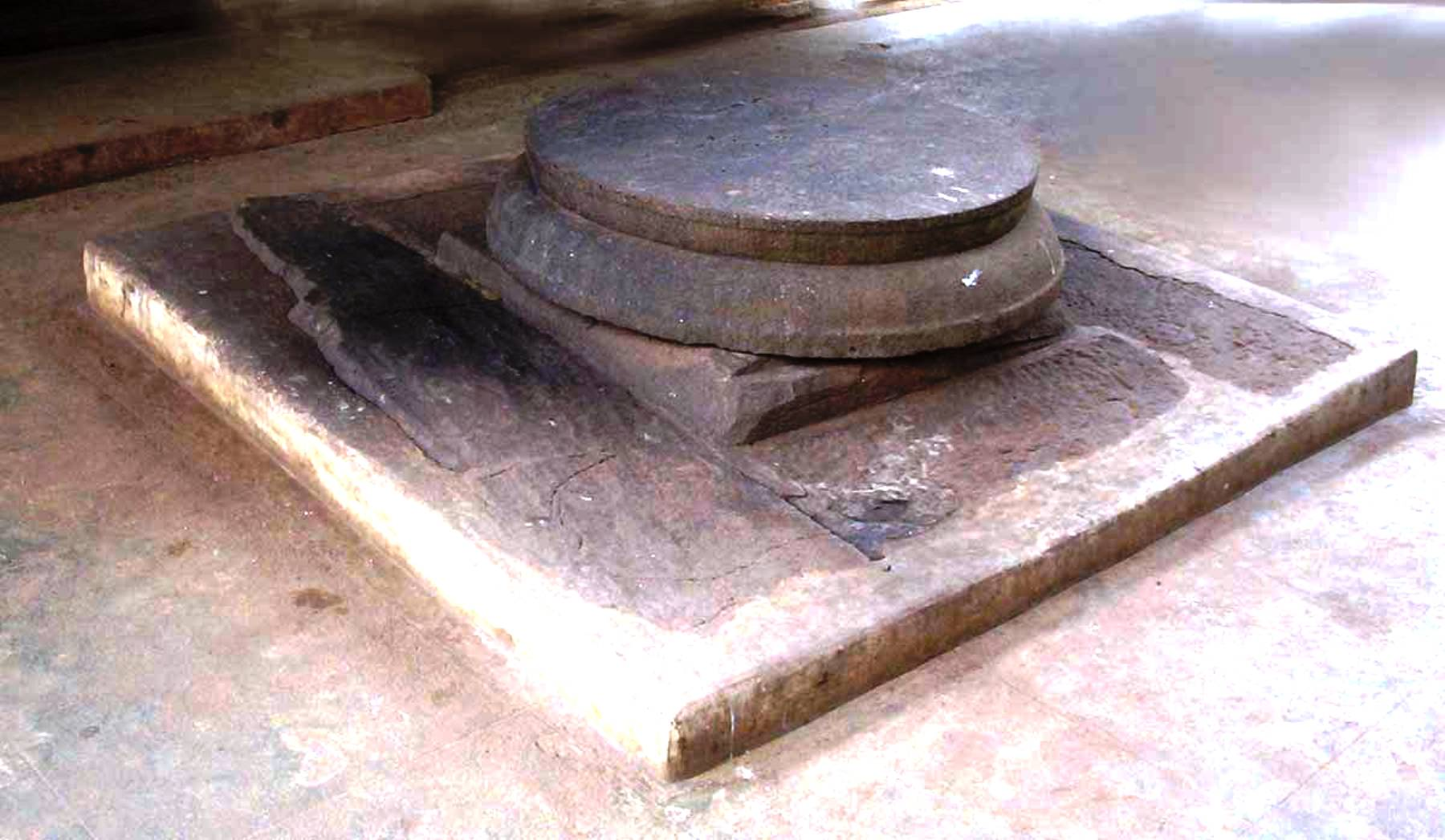 അന്നമനടയിലെ വല്യബലിക്കല്ല്